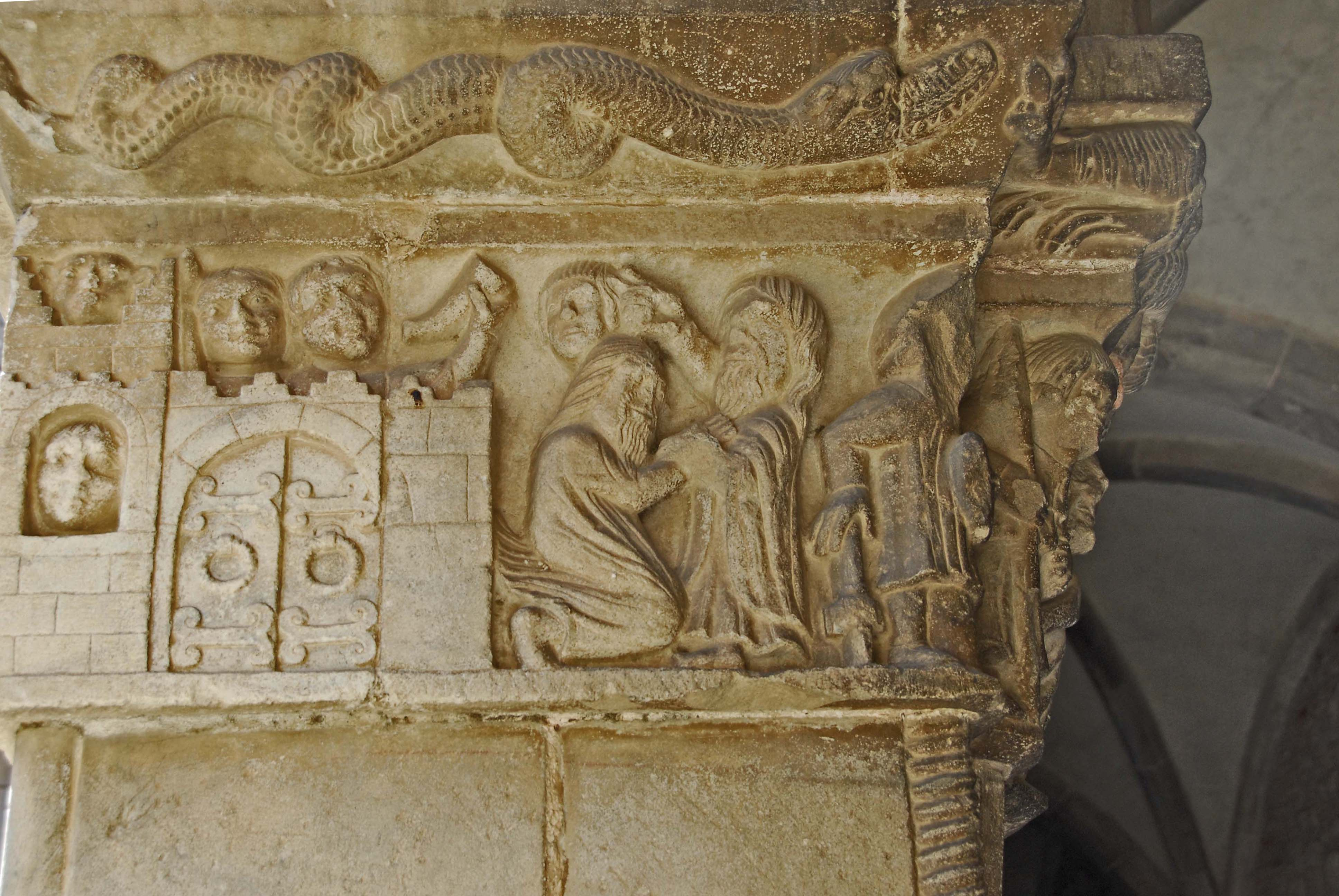 Ste-Eulalie-et-Ste-Julie_d’Elne, Westgalerie, Pfeilerkapitell, "Quo vadis?" vor Rom